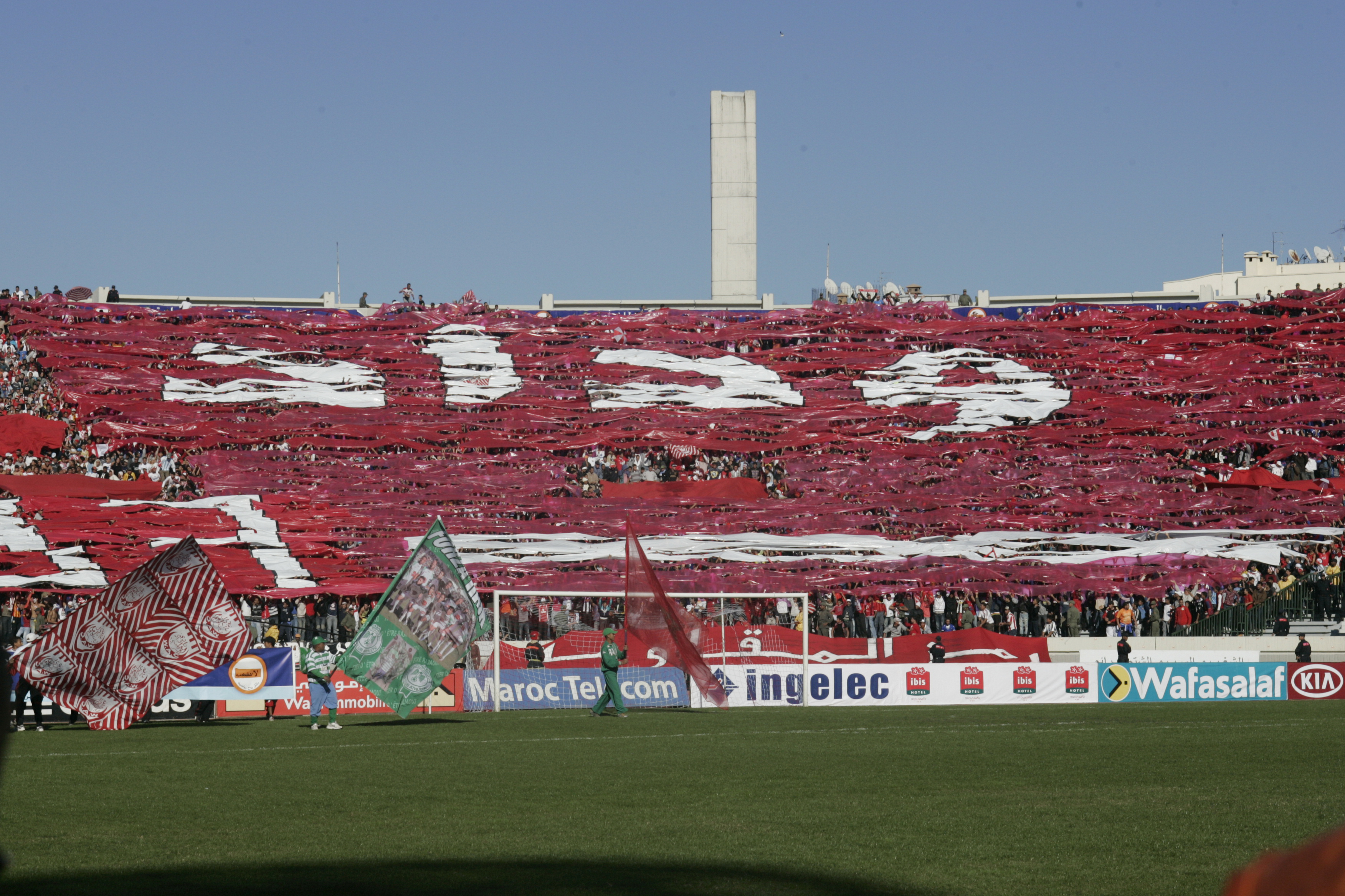 mohamed lassiri vs n